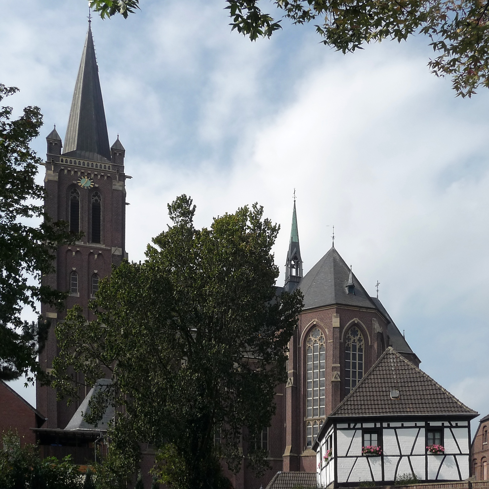 Vorst, Pfarrkirche St. Godehard, Markt 1 This image shows a heritage building in Germany, located in the North Rhine-Westphalian city Tönisvorst (no. 45).